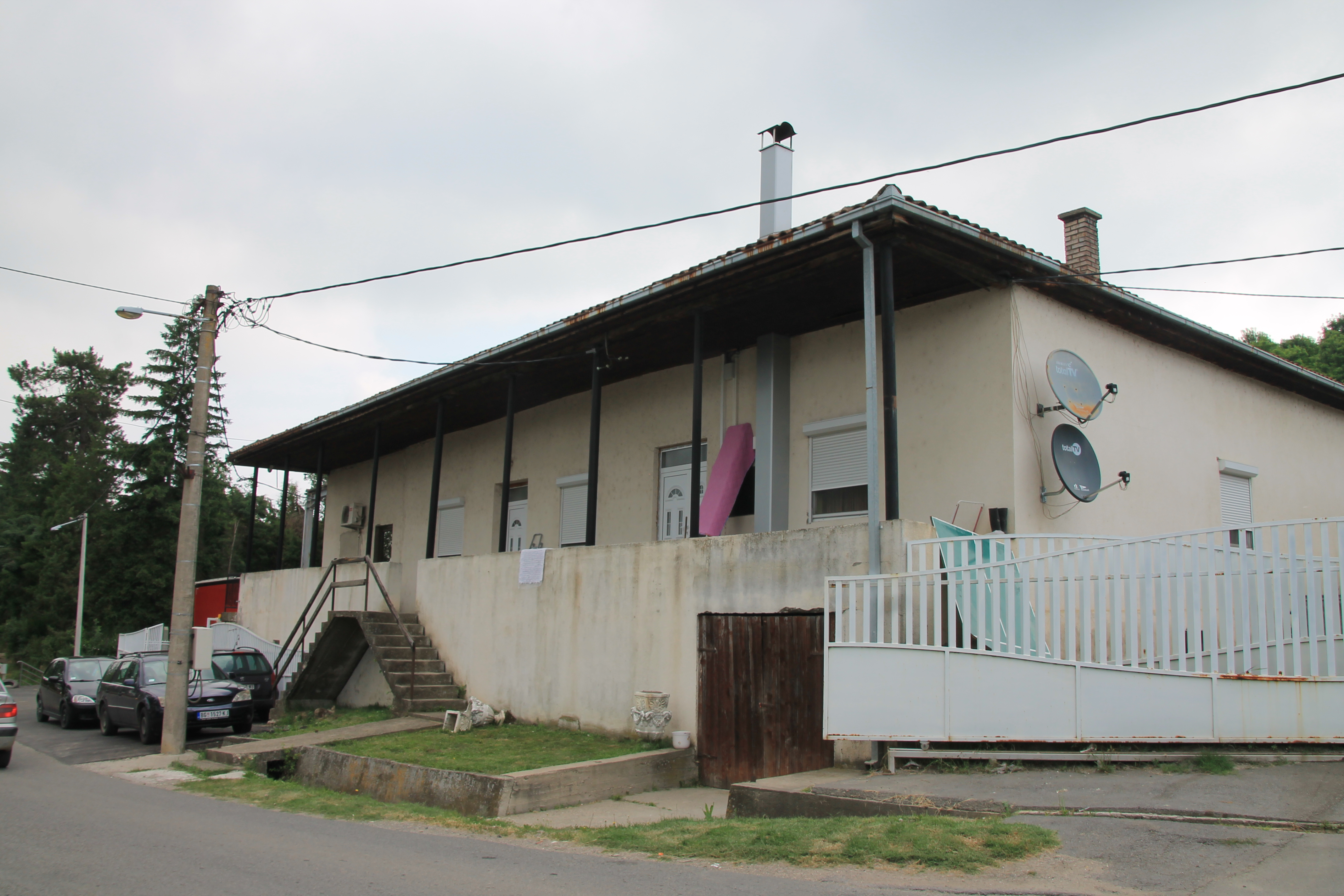 Beljina